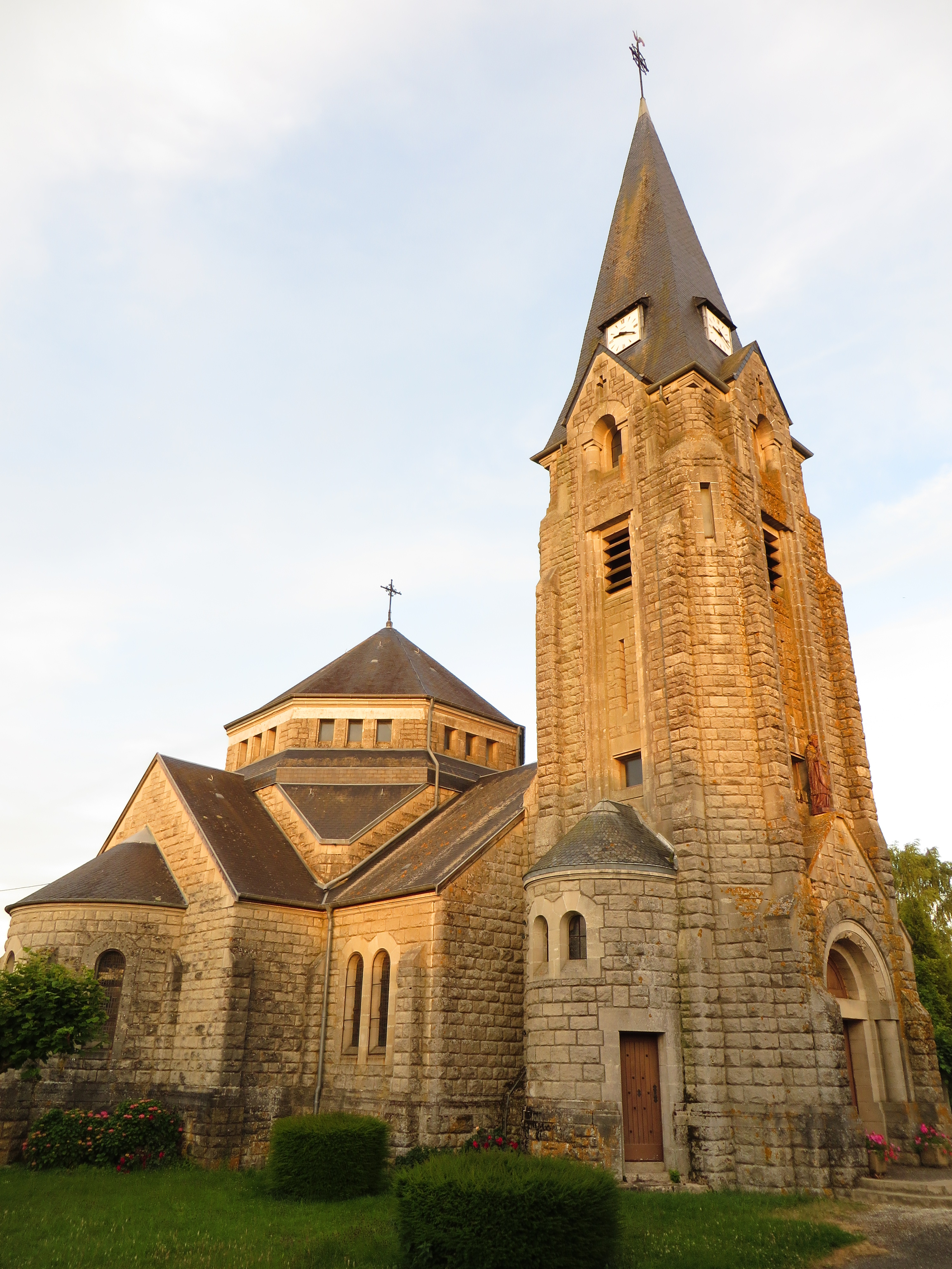 Montigny-devant-Sassey L'église Saint-Martin